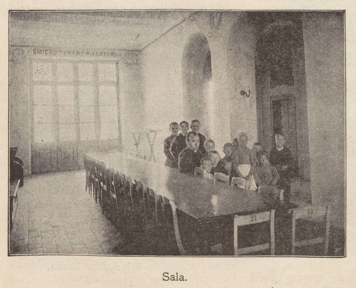 Gmach ochrony XXXIII na ul. Tarczyńskiej